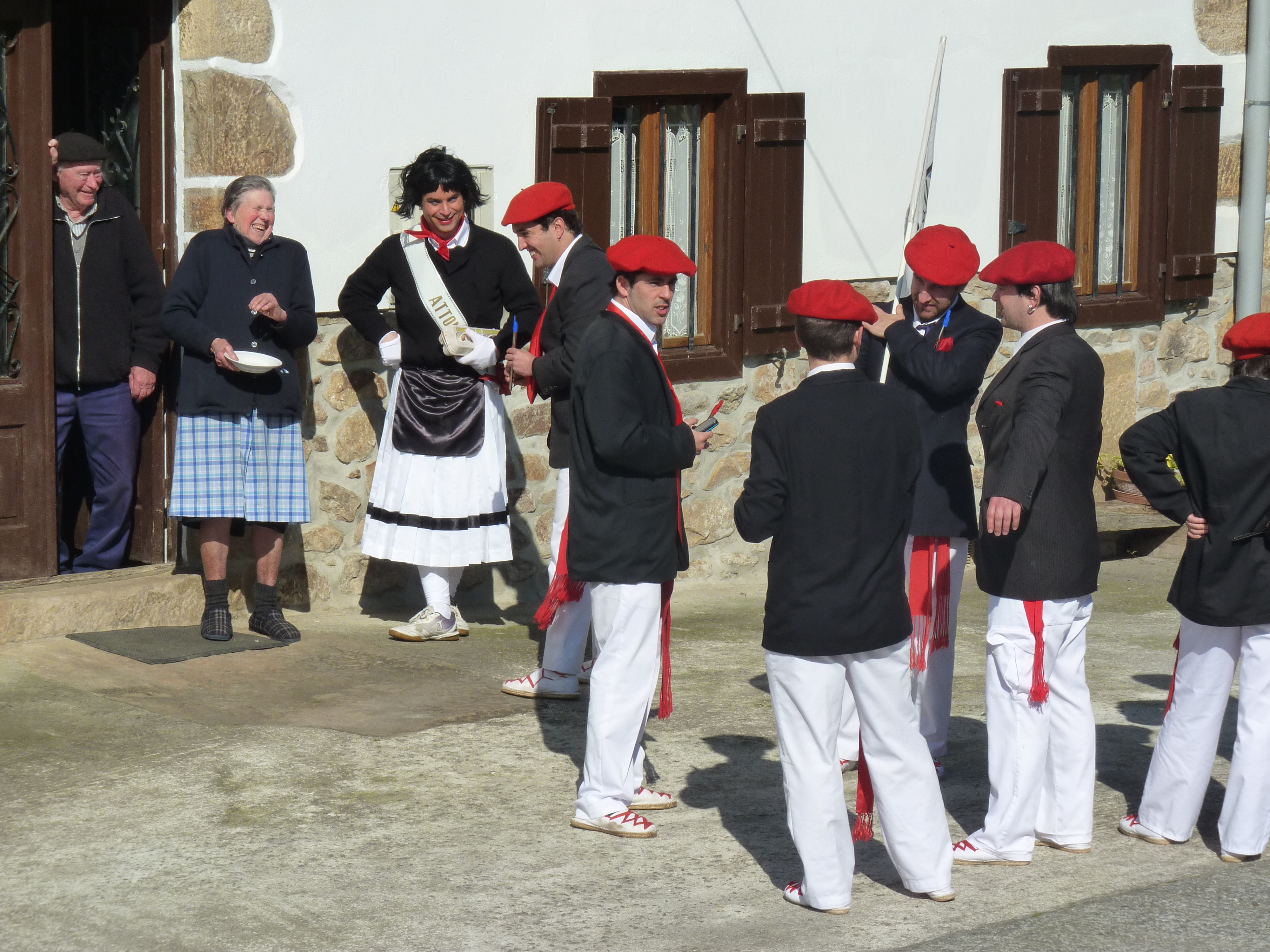 Zingar-arrauzte eskea, Beran.